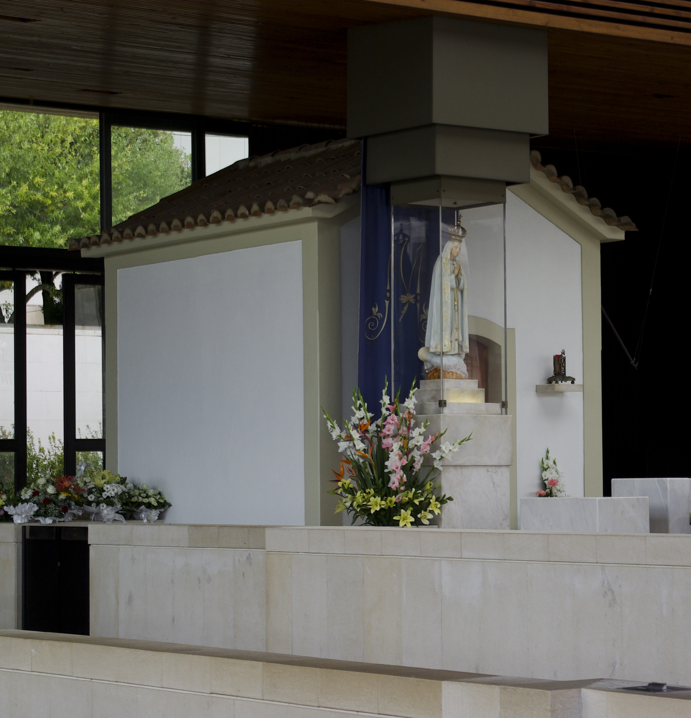 ® S.D. OURÉM SANTUARIO DE FATIMA_ CAPILLA VIRGEN